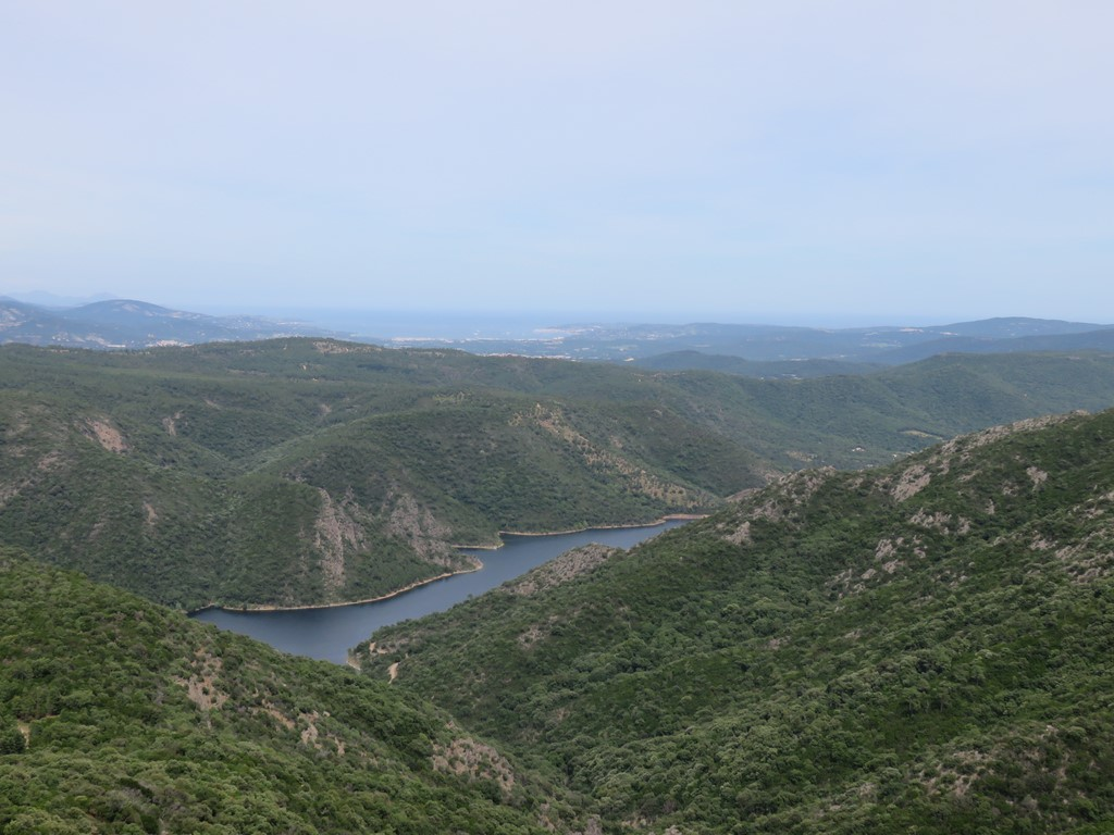 Barrage de la Verne vu depuis la piste de la Capelude - La Môle - Var - France